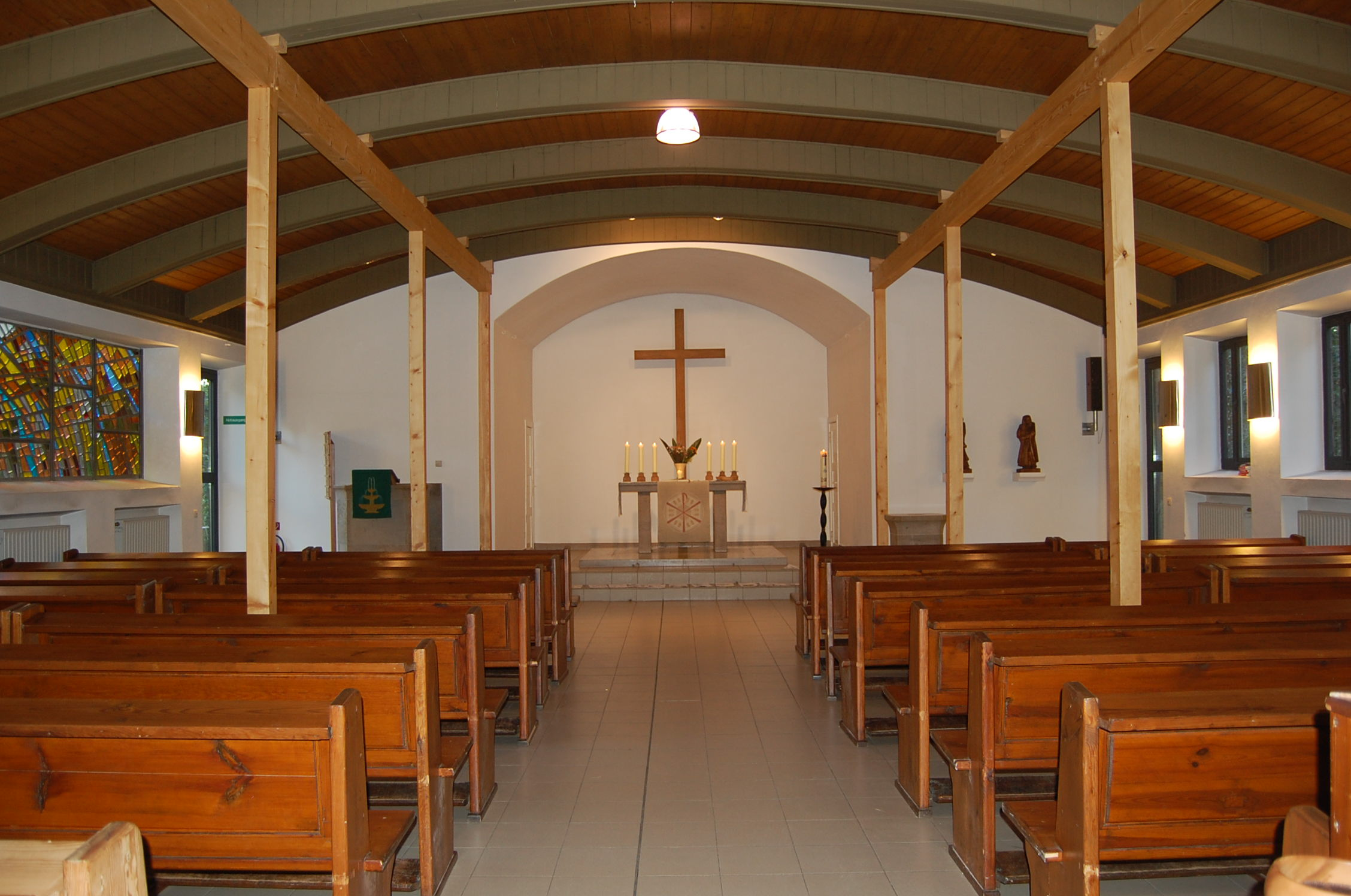 der Kirchsaal in der Auferstehungskirche Kleinmachnow